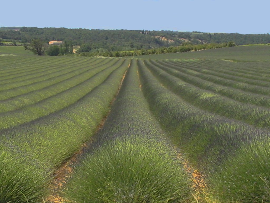 Lavendel, Vauclause, France